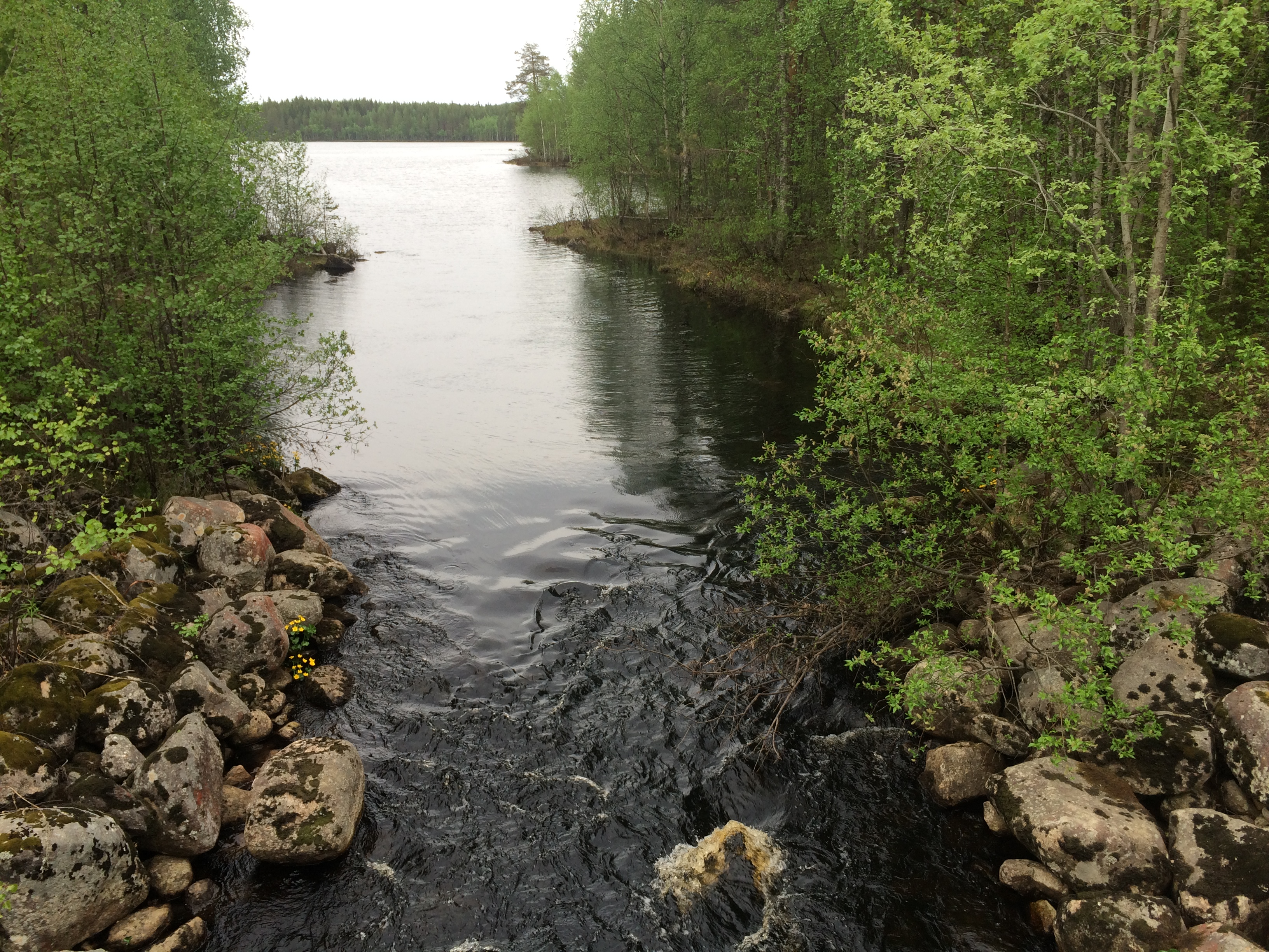 Таракшинойоки